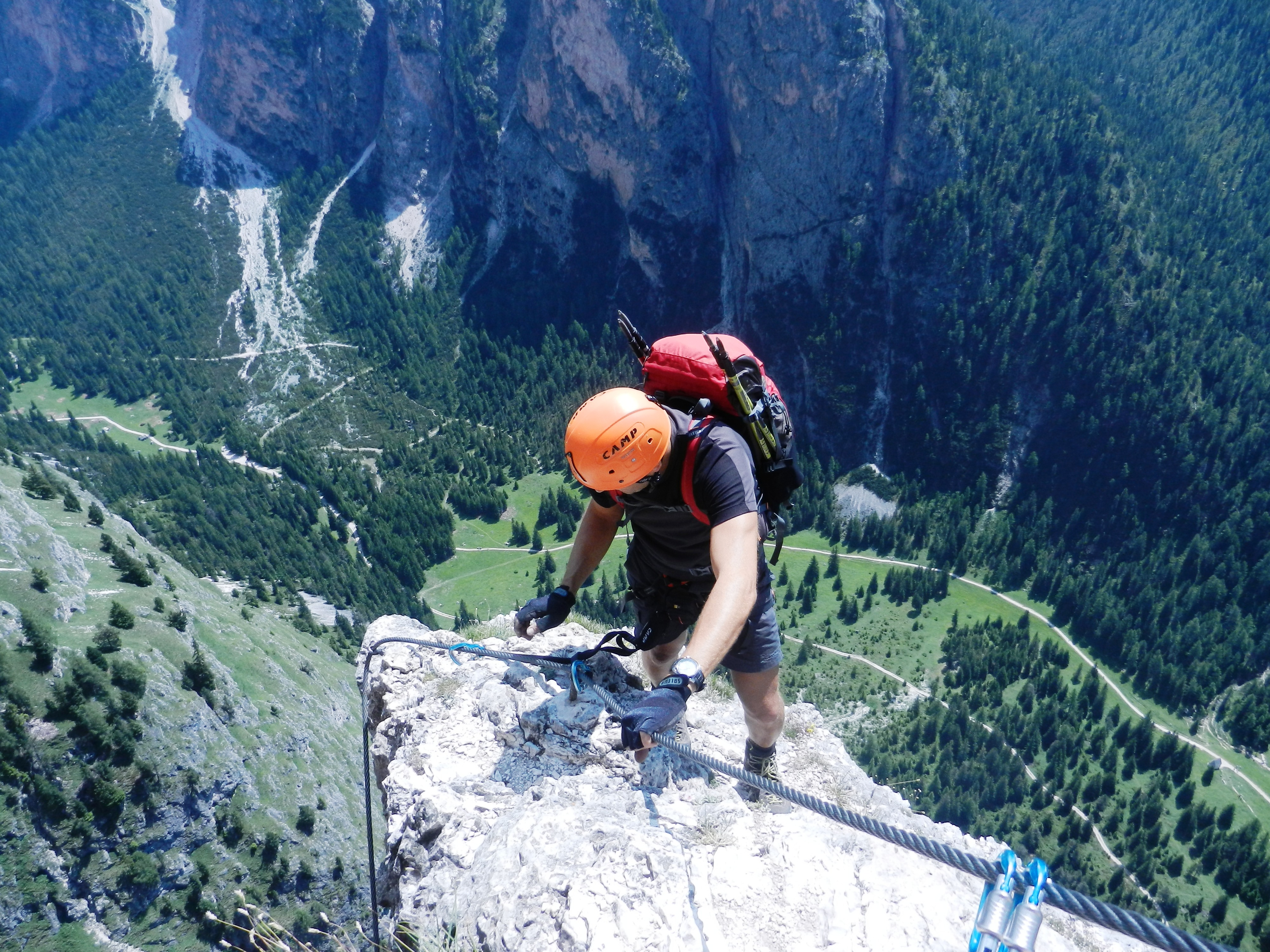 termine ferrata Sandro Pertini